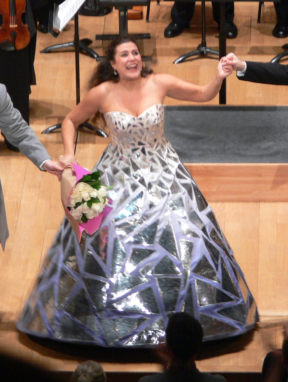 Cecilia Bartoli, after a concert performance of "La Cenerentola", Salle Pleyel, Paris